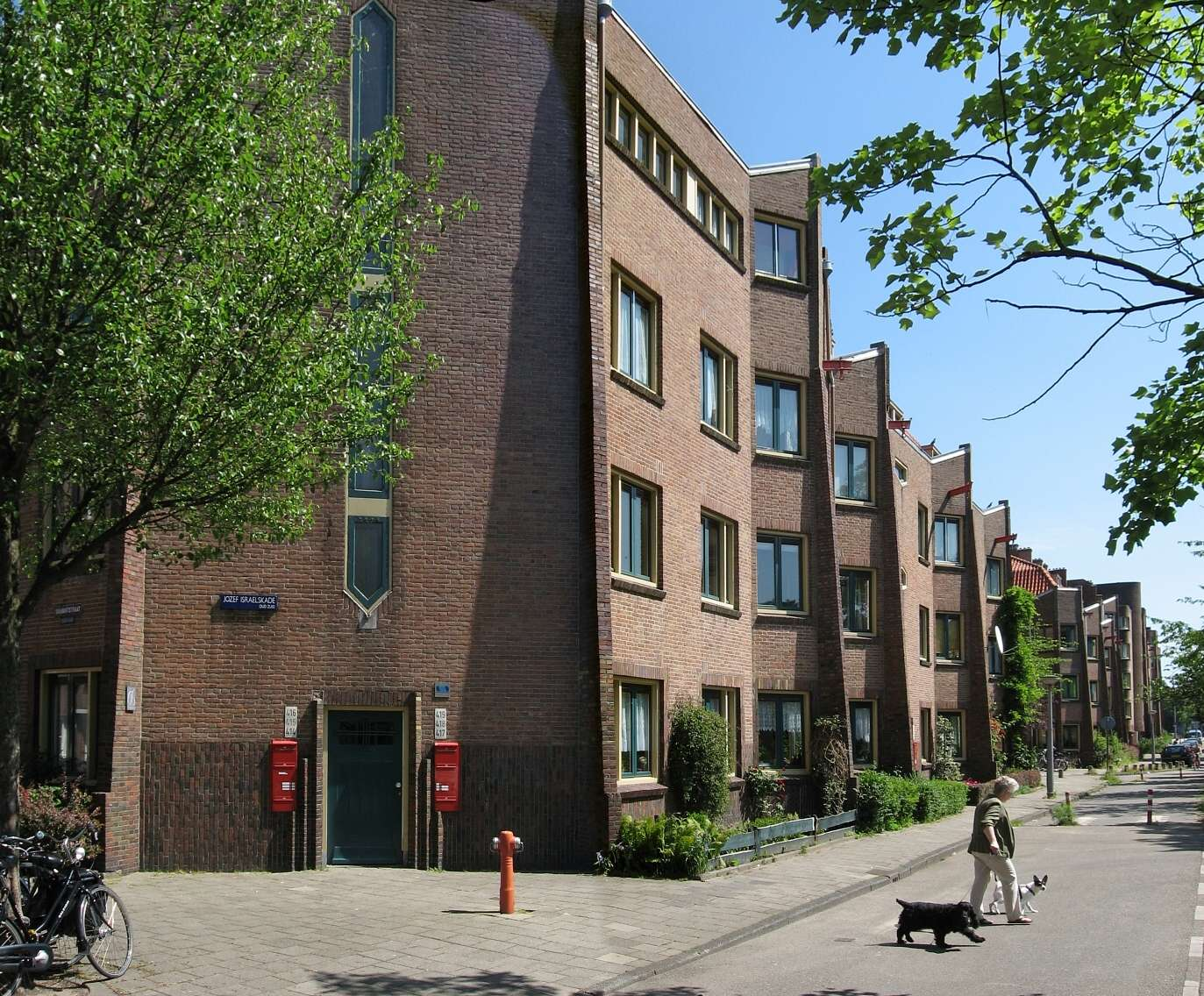 Diamantbuurt, Jozef Israelskade. Links 'Schilderskade 66'. Gevel met verticale elementen en geel-groene raamkozijnen (Van Epen). Panoramafoto gemaakt met PTGUI.